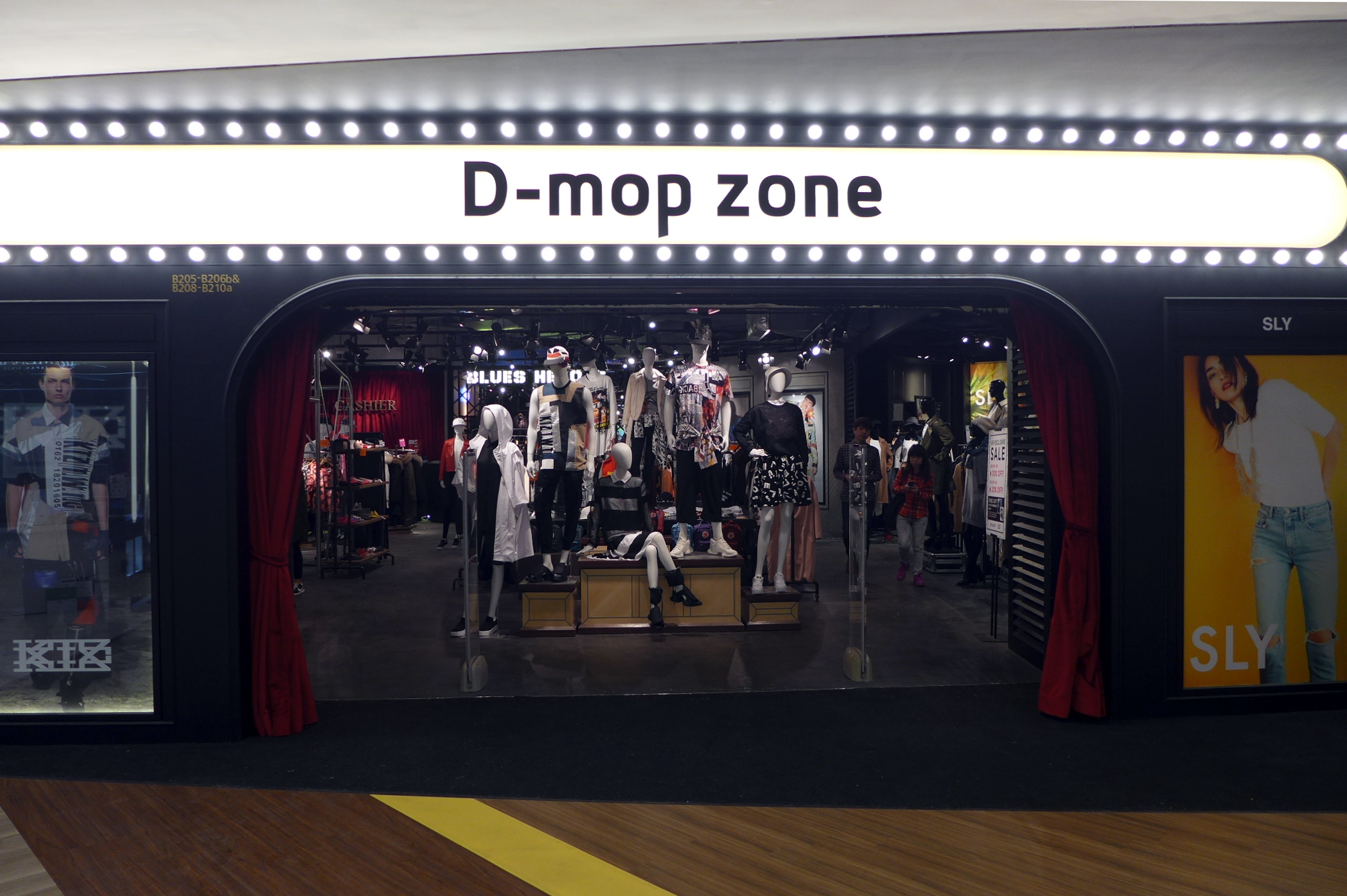 D-mop zone in K11